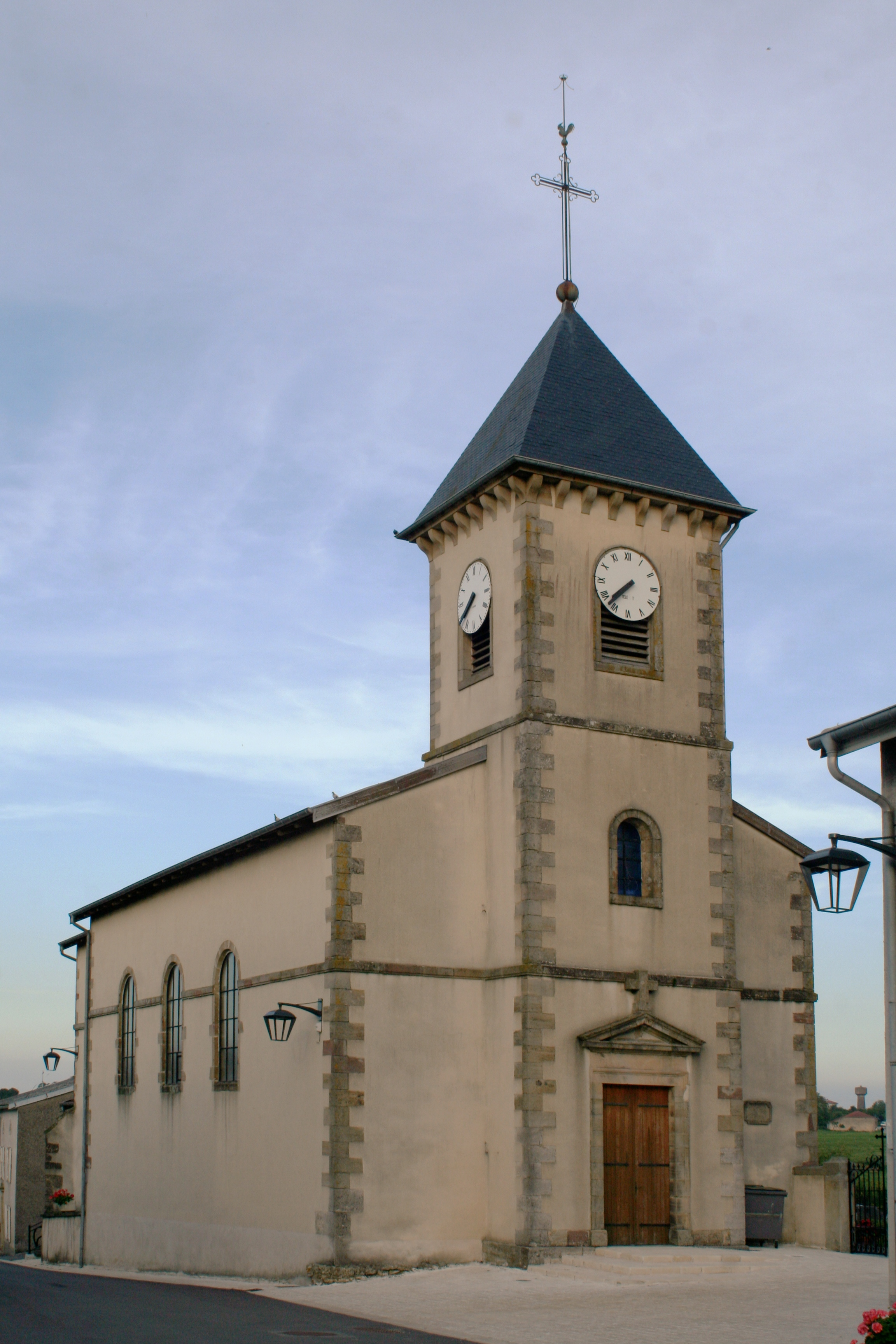 Église de Saint-Genest (Vosges)